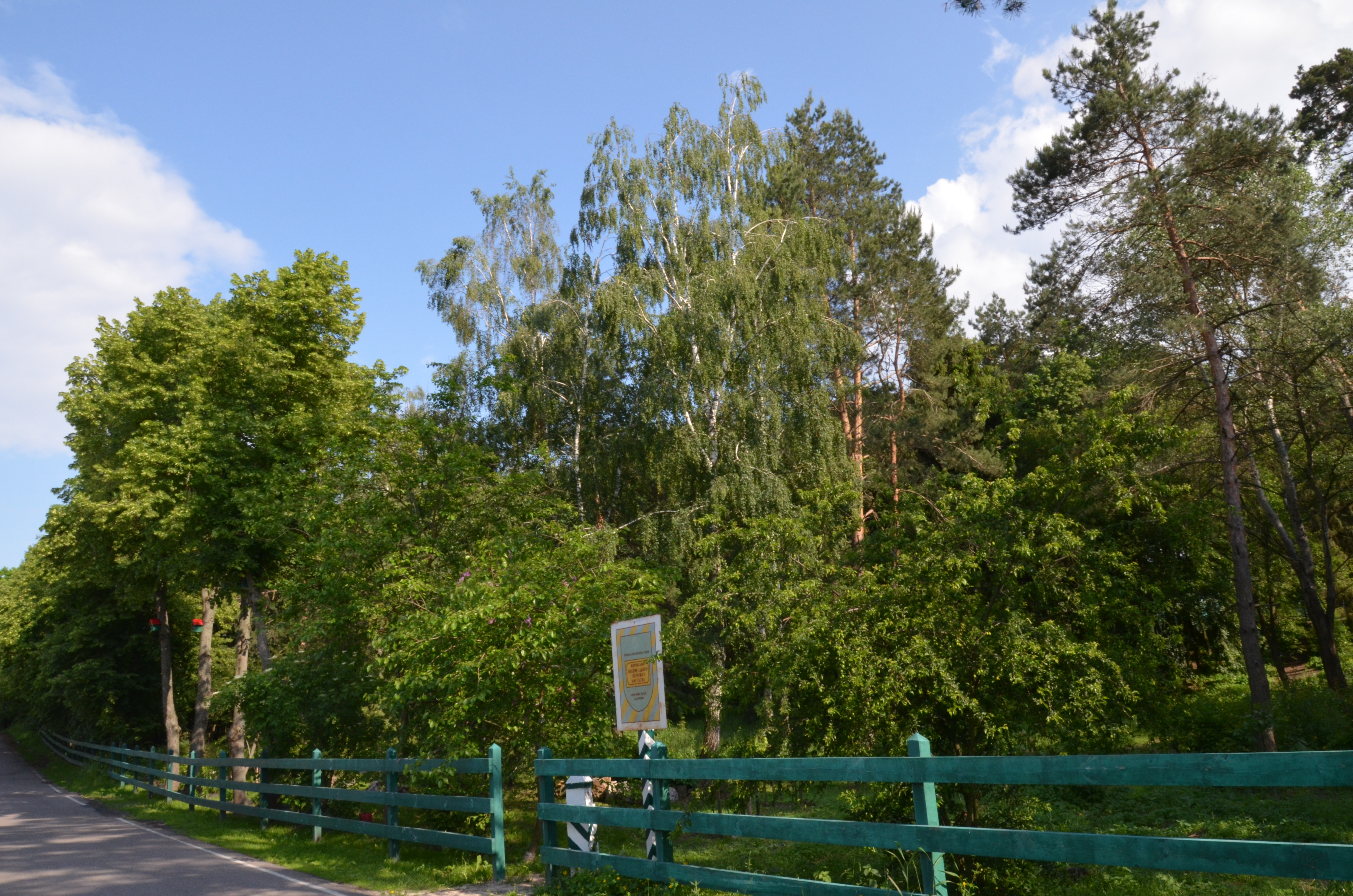 «Жорнівський», Києво-Святошинський район, Жорнівська сільська рада